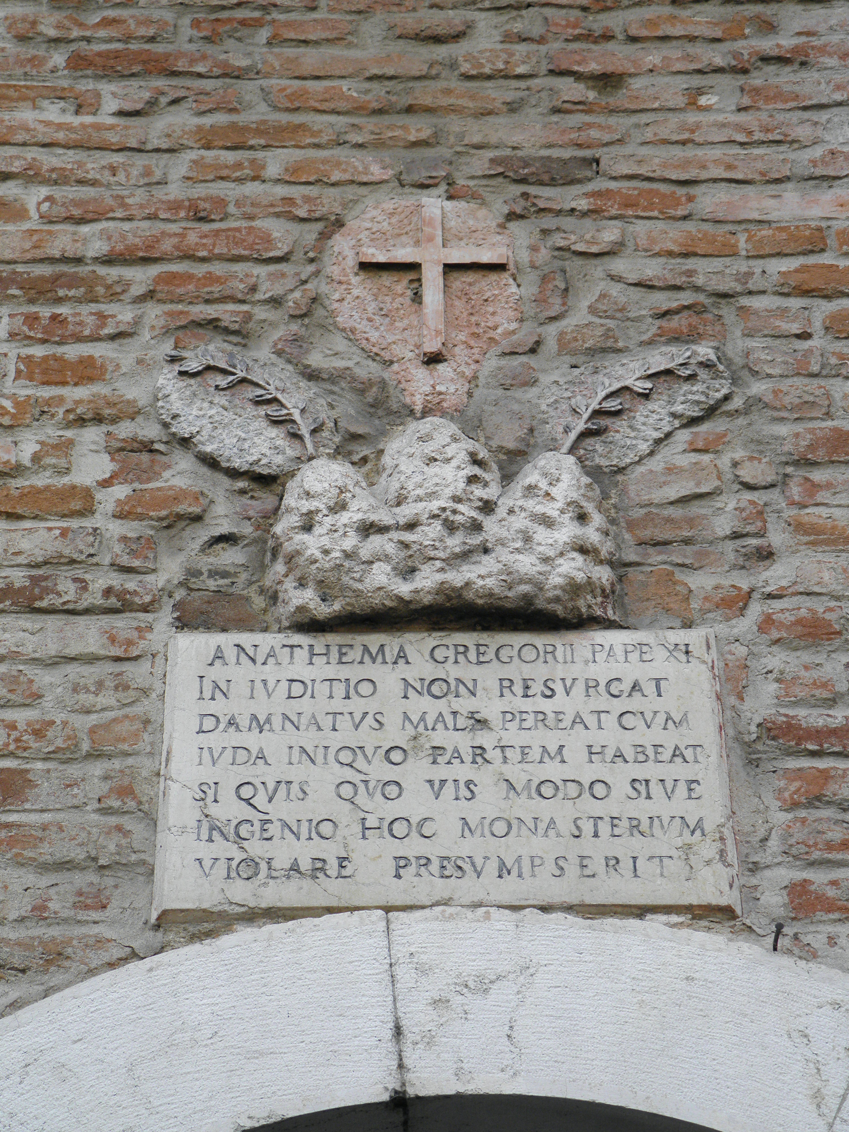 Rovigo: lapide murata all'ingresso del chiostro dell'ex monastero degli Olivetani.